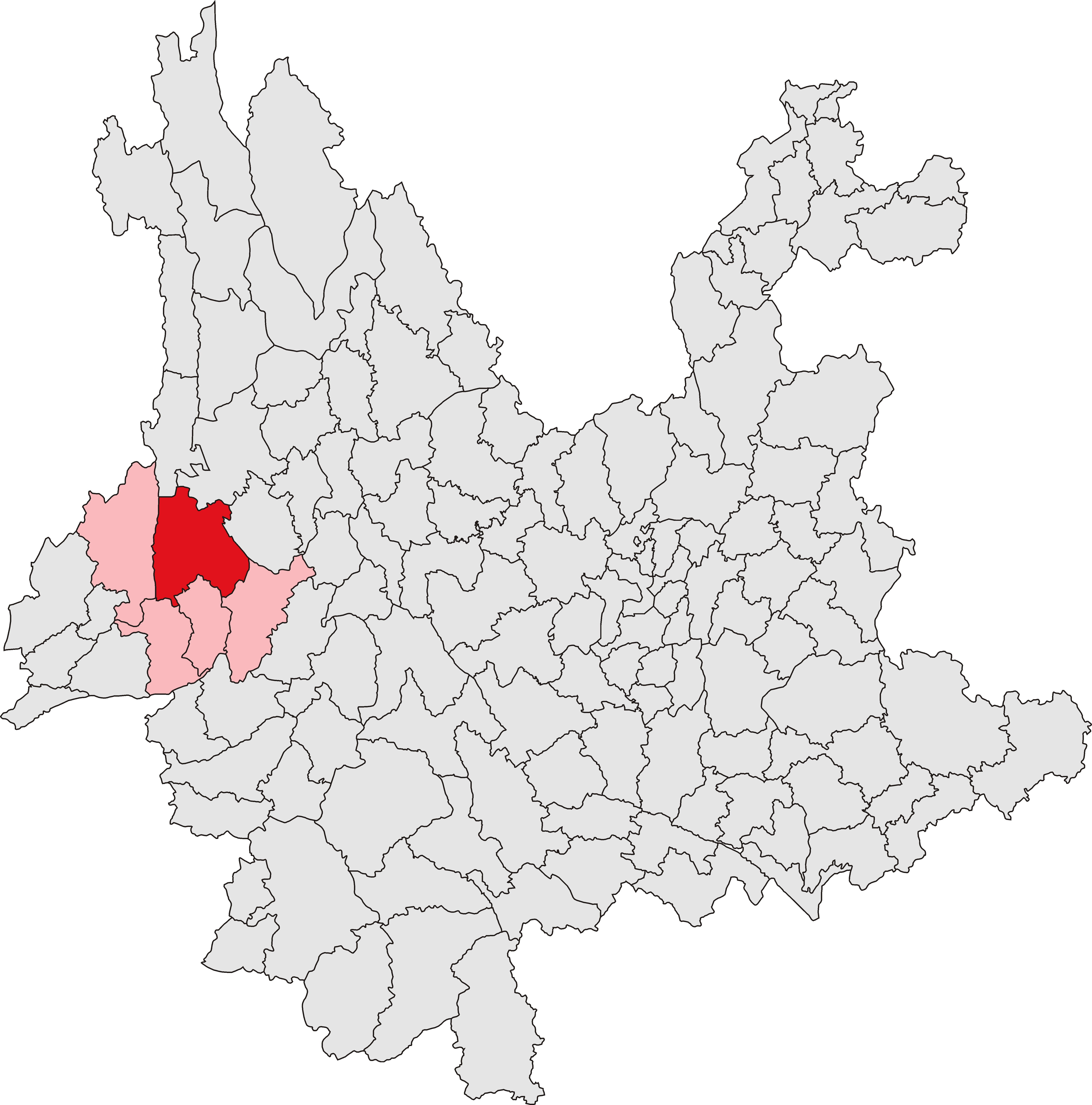 中文（中国大陆）: 隆阳区位置图